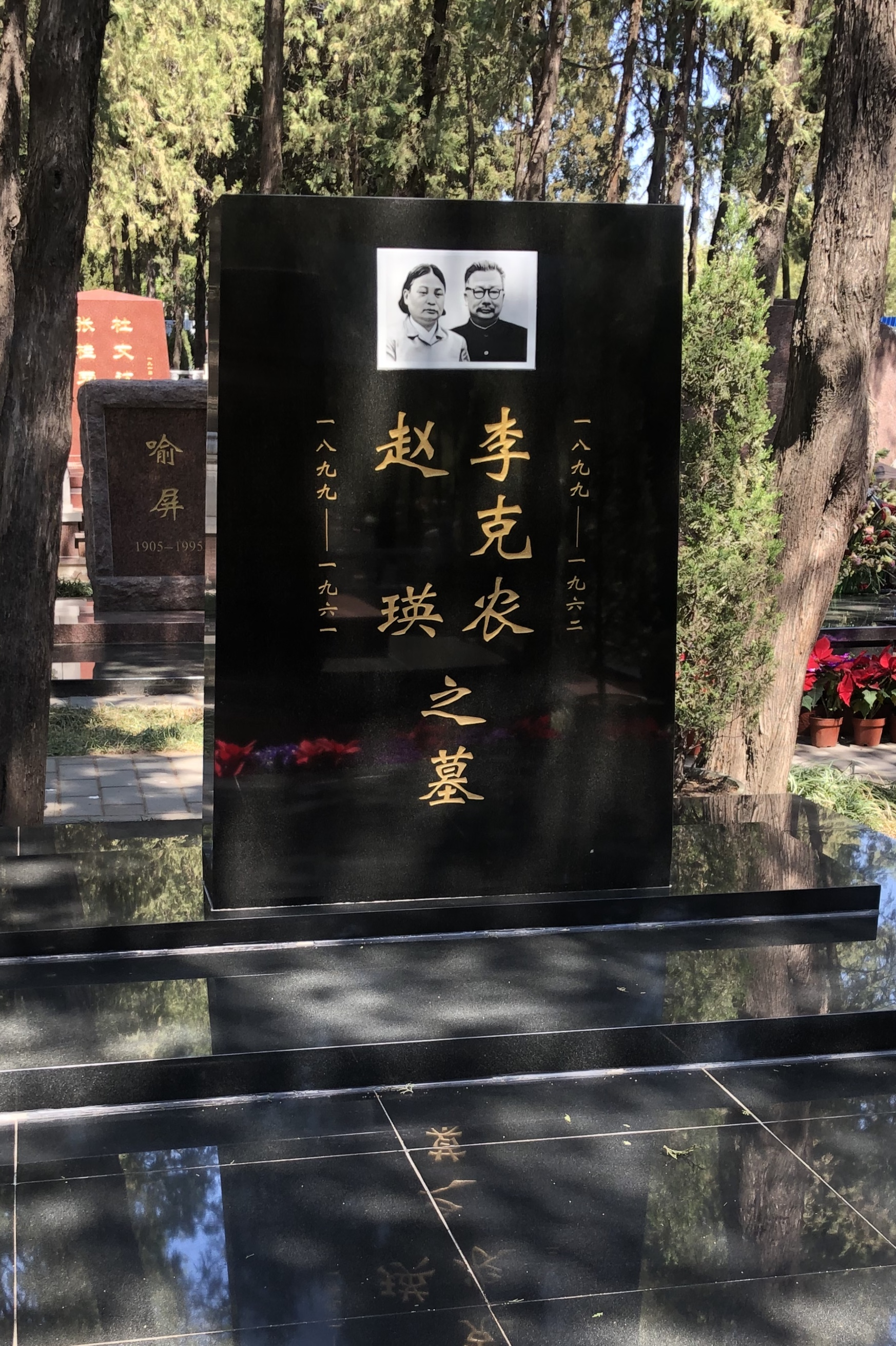 李克农与其妻合葬墓，李克农为中华人民共和国、中共早期情报机构、特务机构领导者之一。